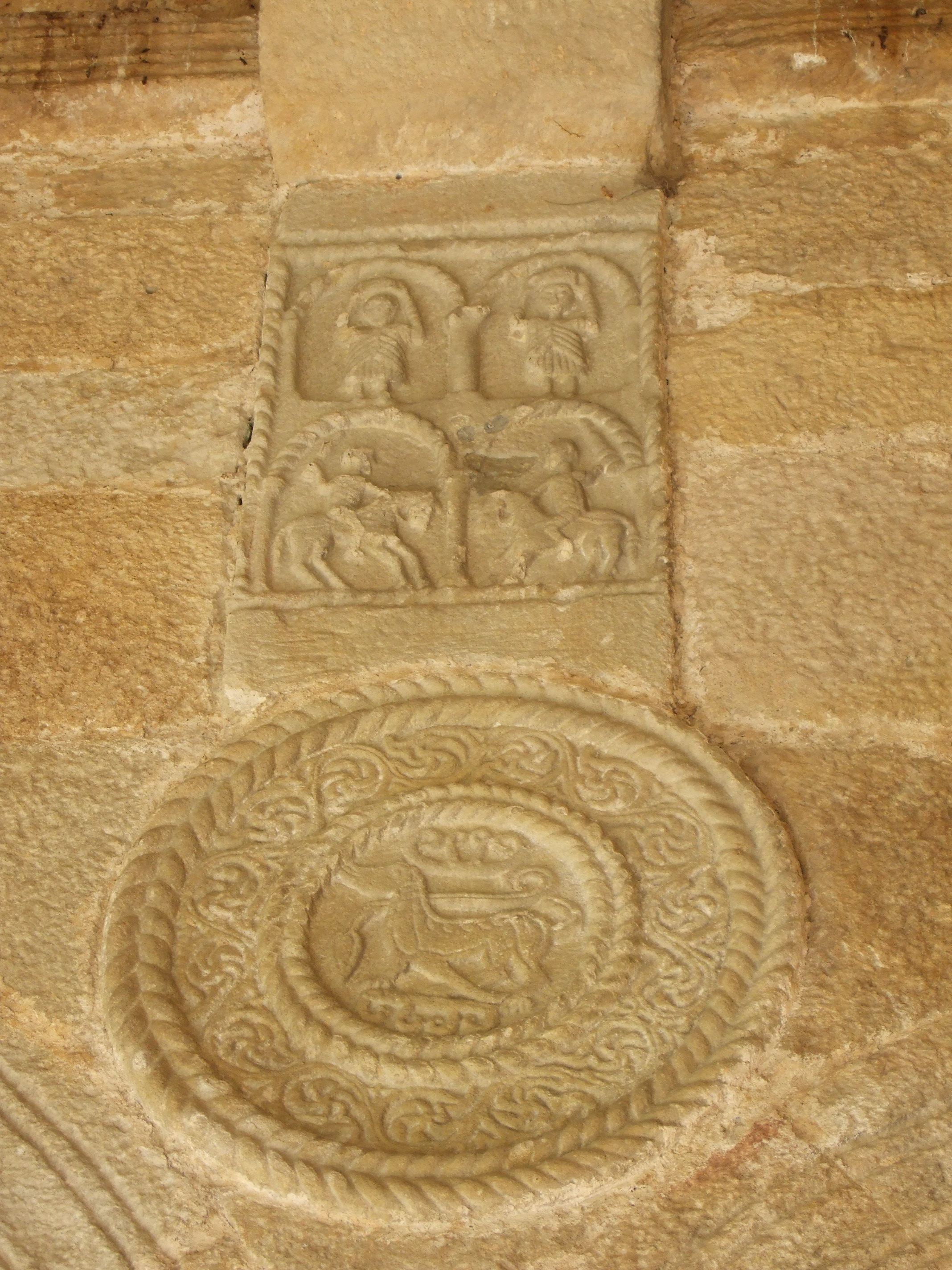 Oviedo - Santa María del Naranco - Detalle interior